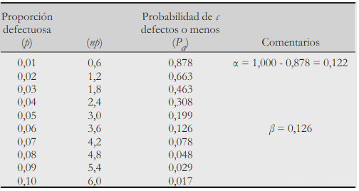 Muestreo de Asignación